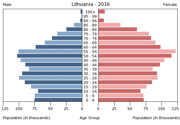 A population pyramid illustrates the age and sex structure of a country's population and may provide insights about political and social stability, as well as economic development. The population is distributed along the horizontal axis, with males shown on the left and females on the right. The male and female populations are broken down into 5-year age groups represented as horizontal bars along the vertical axis, with the youngest age groups at the bottom and the oldest at the top. The shape of the population pyramid gradually evolves over time based on fertility, mortality, and international migration trends.